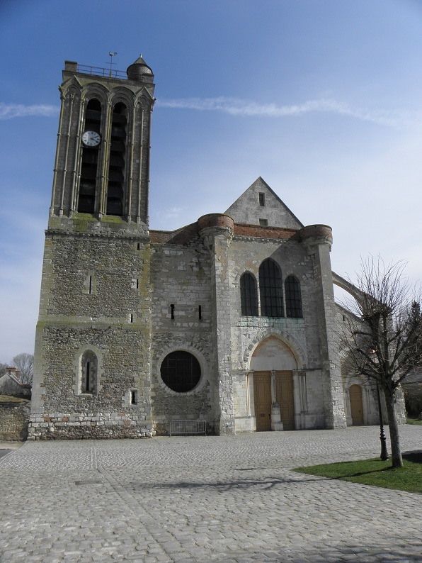 Façade occidentale de la collégiale Saint-Martin de Champeaux (77).